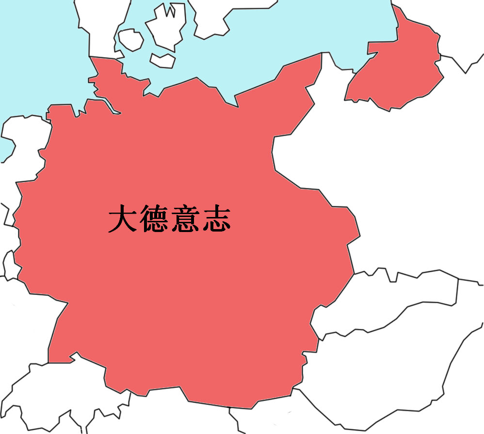 1939年8月31日的德国版图。